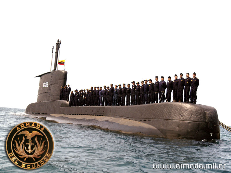 Submarino SS Huancavilca (S102)